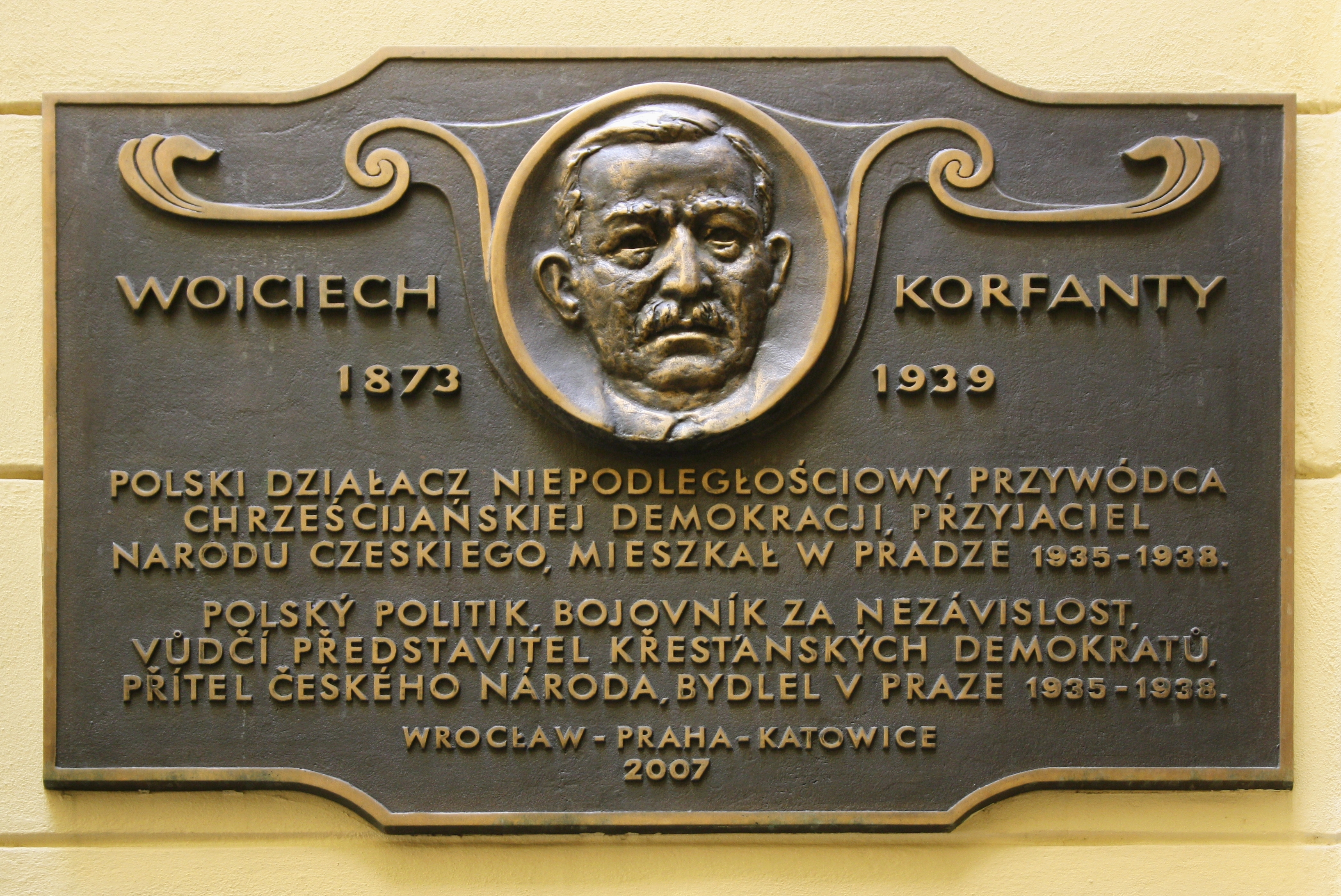 Pamětní deska – Wojciech Korfanty. Nerudova 13, Malá Strana čp. 250, Praha.